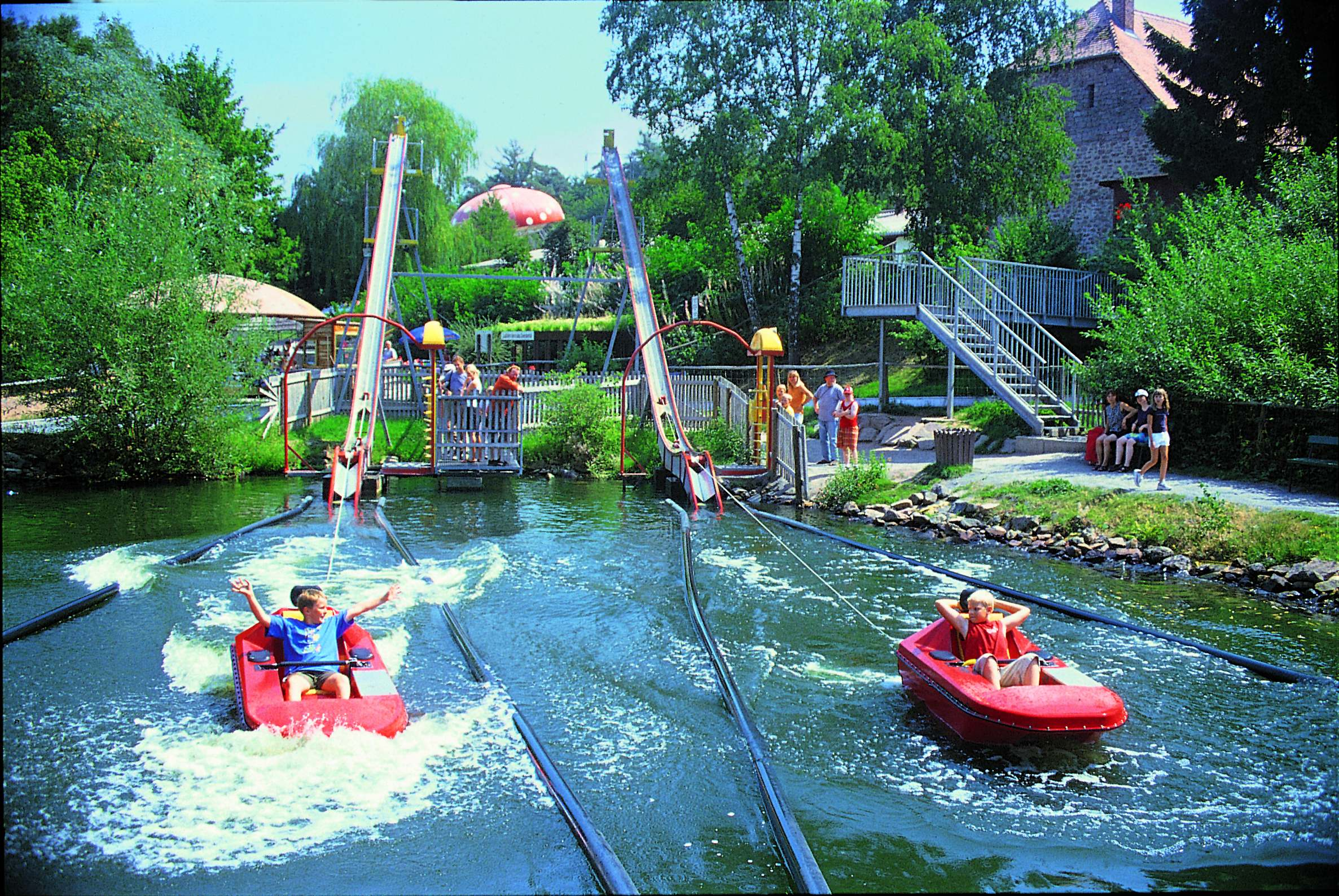 Wasserbob Nautic Jet